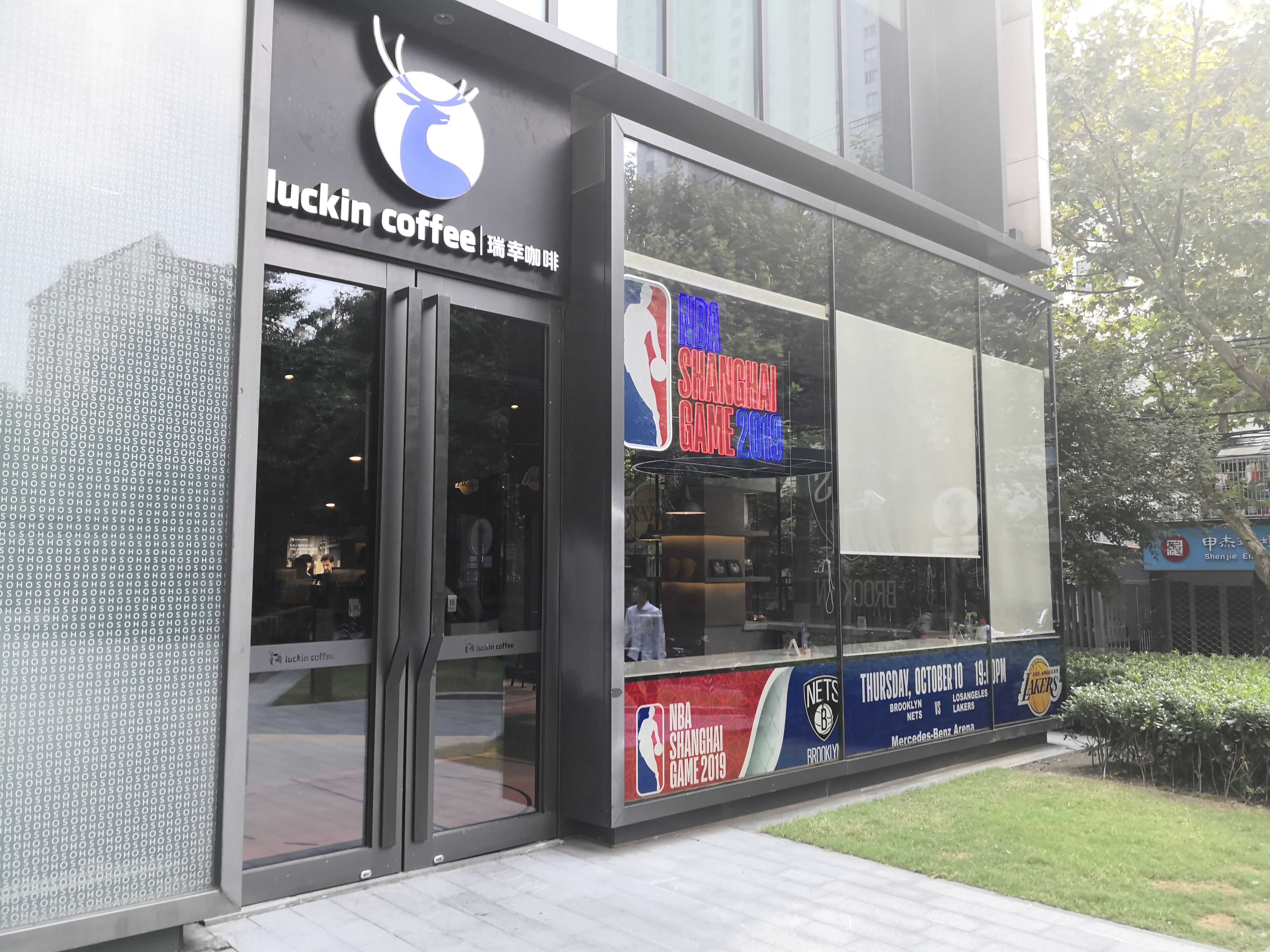 获得NBA官方授权的瑞幸咖啡上海复兴SOHO店